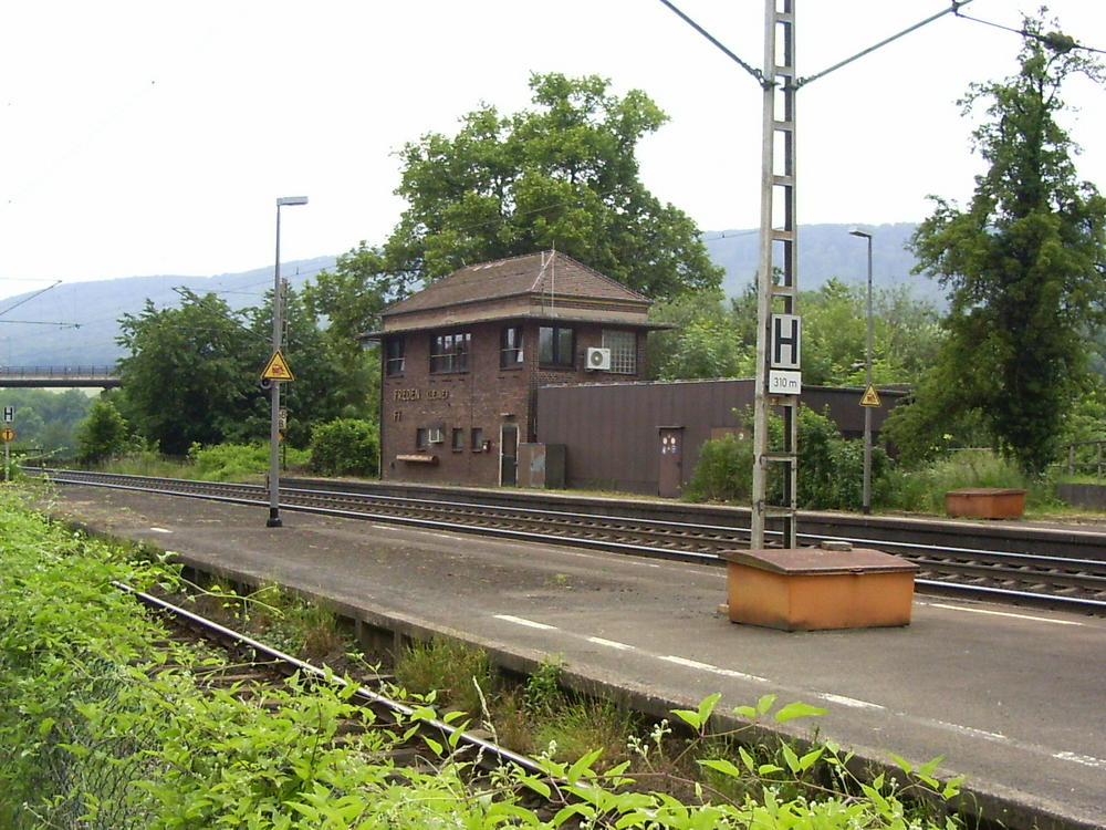 Signal box at Freden/Leine (de)